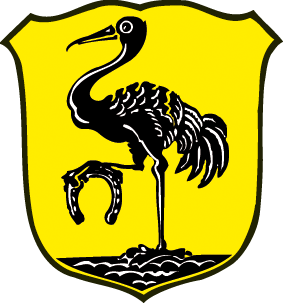 Wappen von Neugersdorf